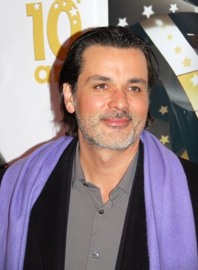 Christophe Barratier à la cérémonie des Etoiles d'or du cinéma français